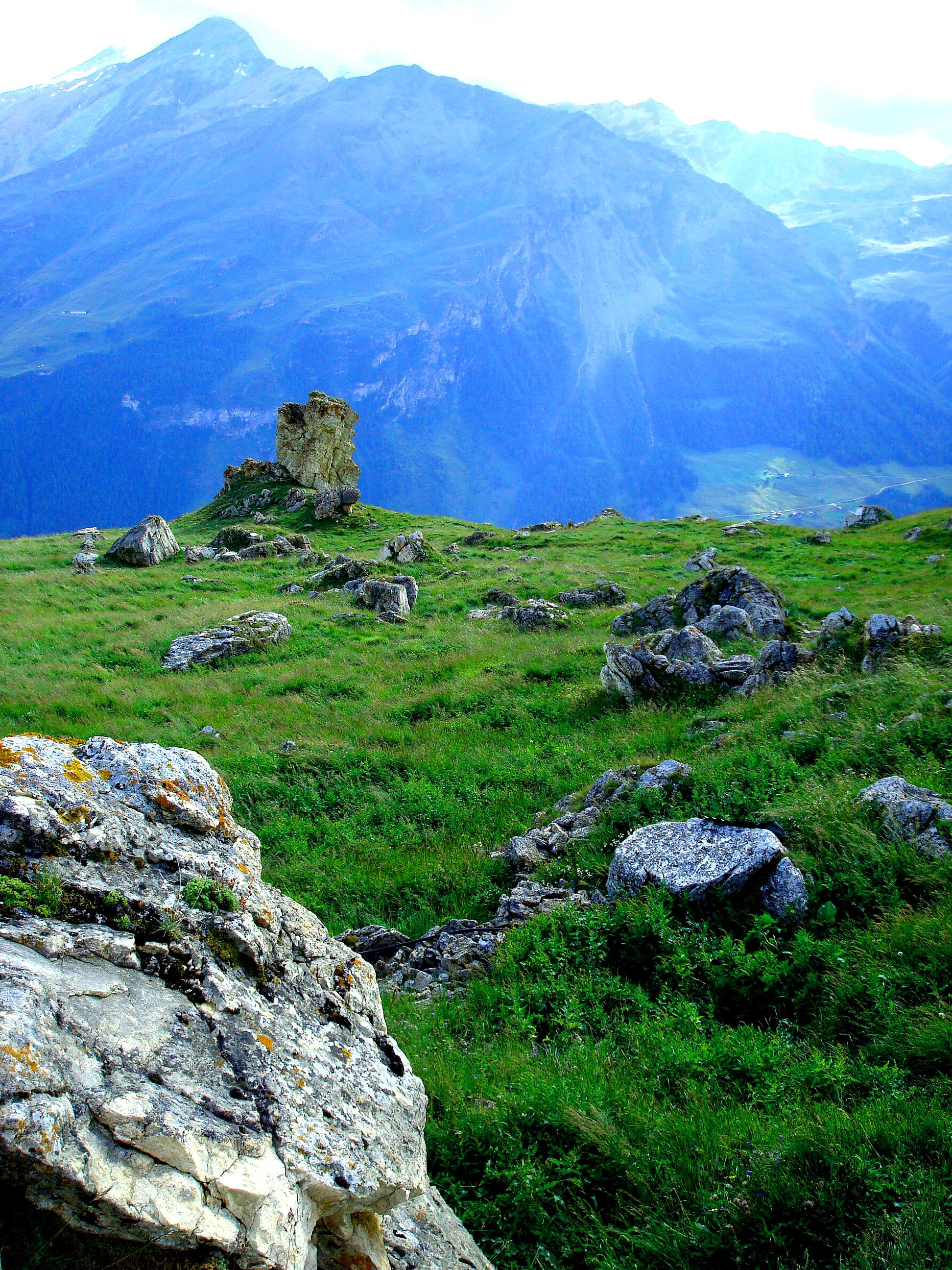 Suisse, canton du Valais, alpage de Cotterg, les pierres à cupules, paradis des marmottes.